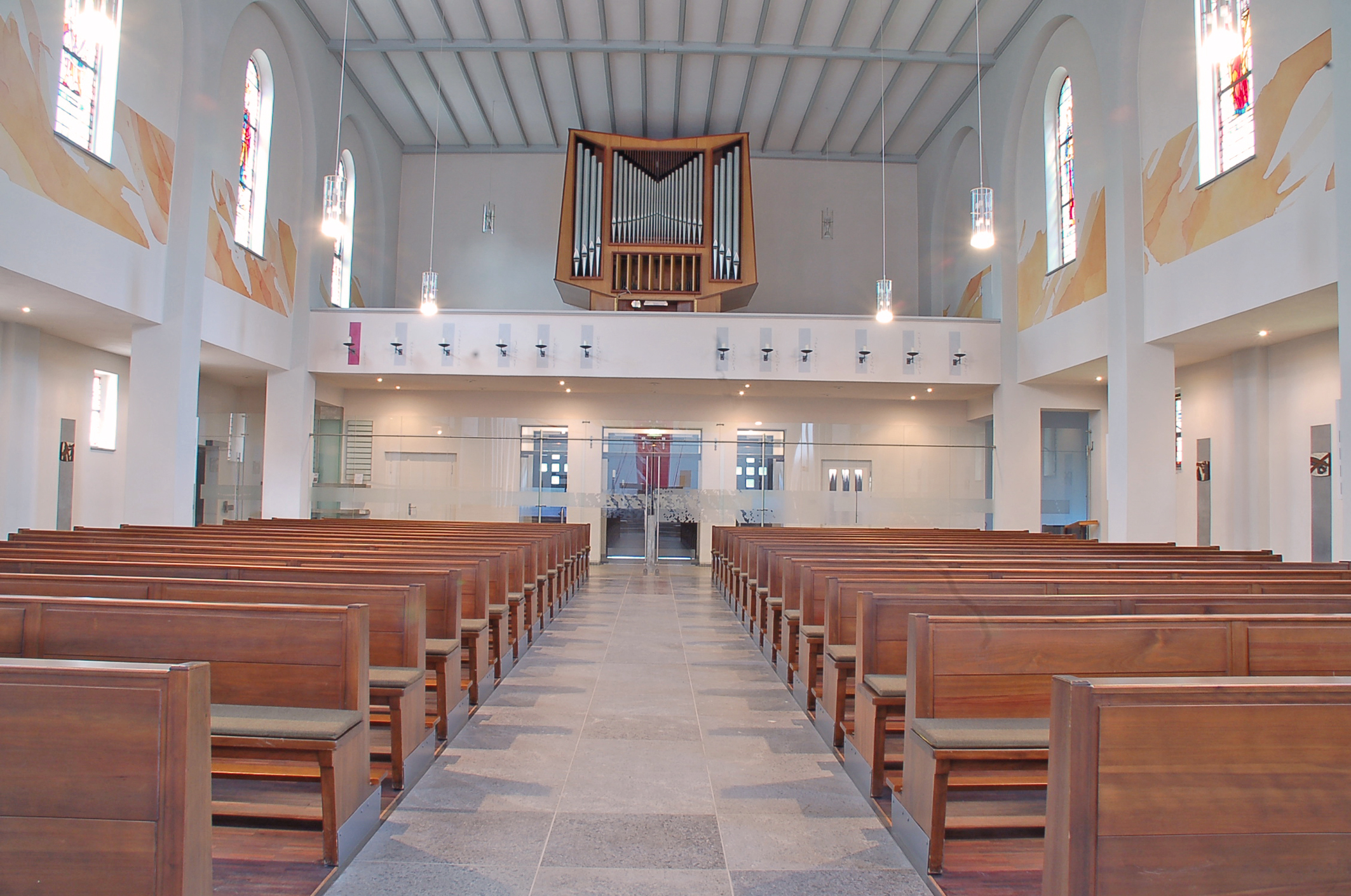 Orgelempore mit Apostelleuchten